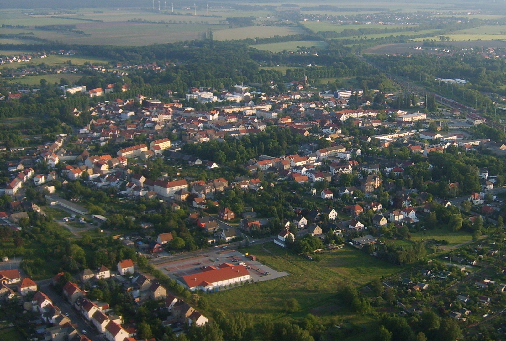 Die Stadt Elsterwerda aus der Luft.